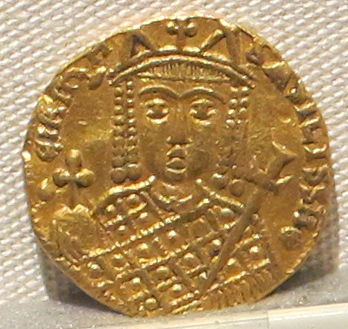 Palazzo Massimo alle Terme